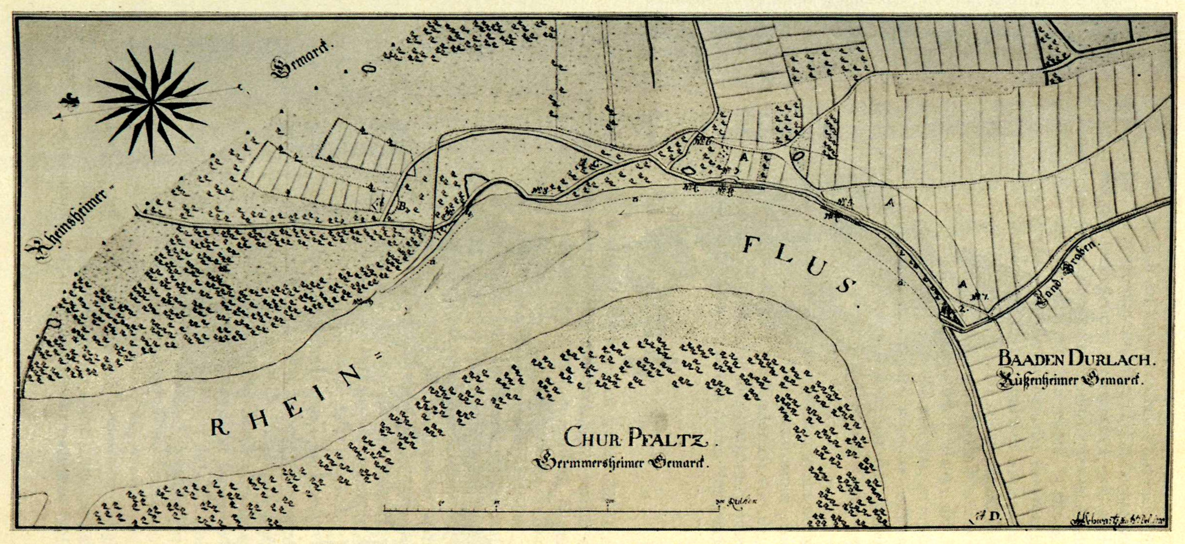 Rhein bei Knaudenheim. In Bildmitte die Rheininsel Ceylon, rechts am Prallhang des Rheins das 1758 aufgegebene Knaudenheim. Infolge der anhaltenden Seitenerosion müssen weiterhin Äcker, Dämme und Straßen aufgegeben werden.